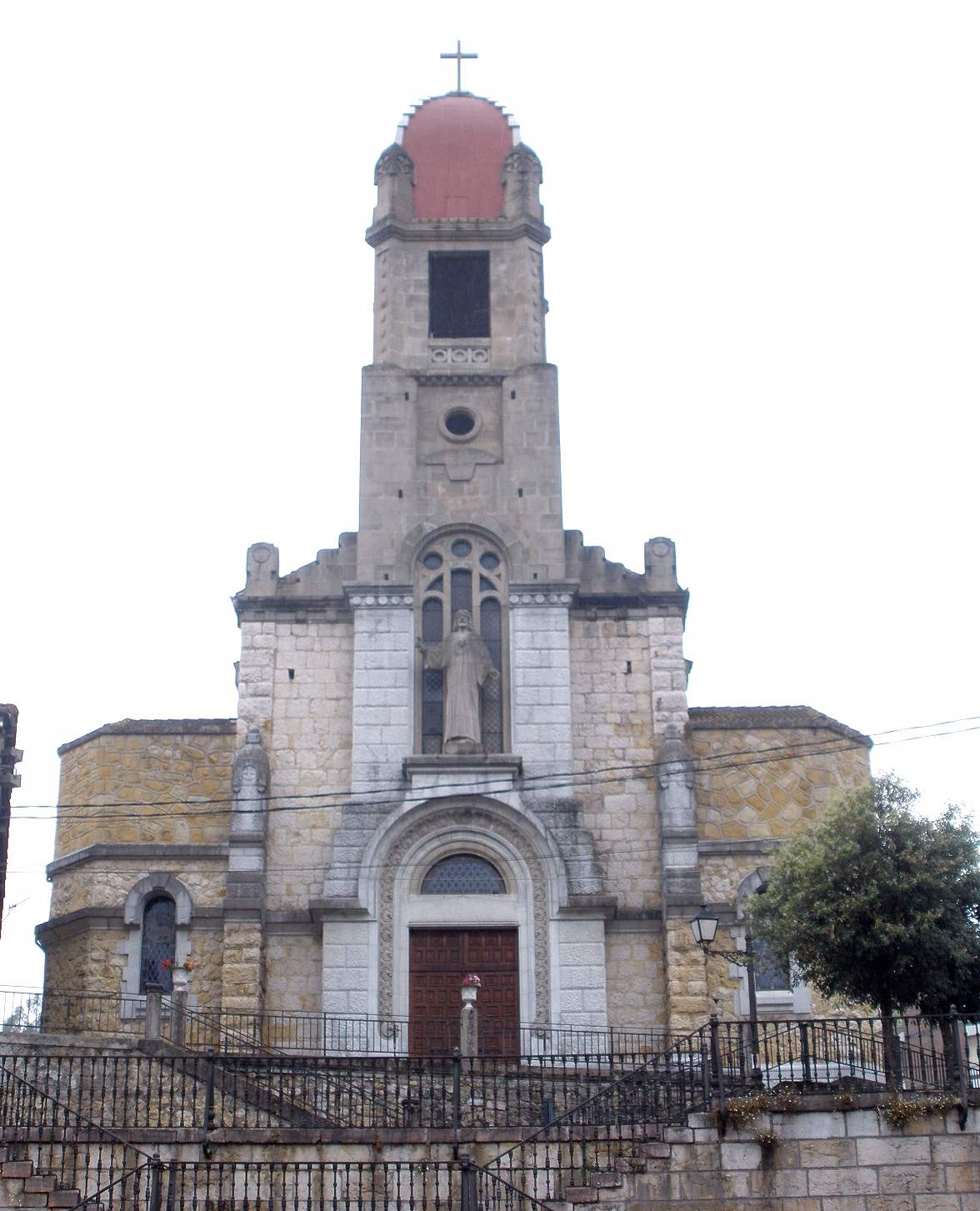 Iglesia de San Antonio de Padua, en Infiiesto (Piloña, Asturias)